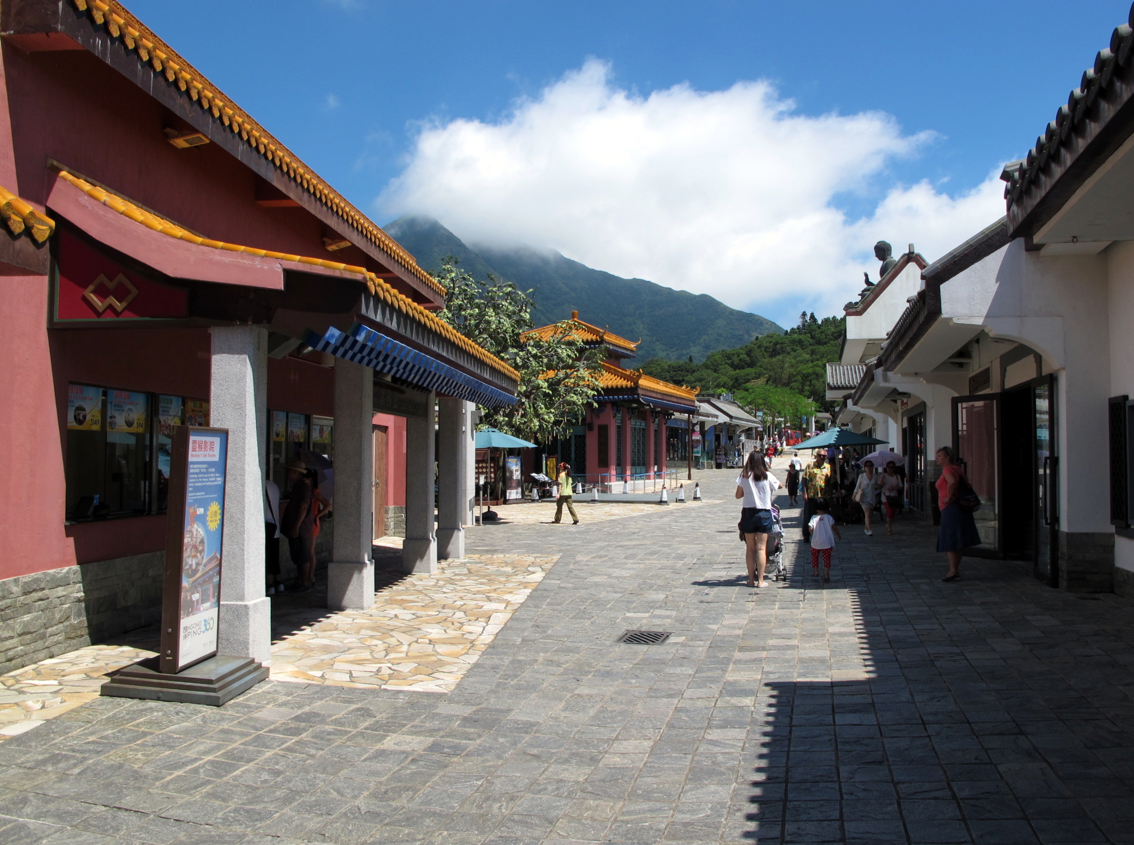 Ngong Ping Village